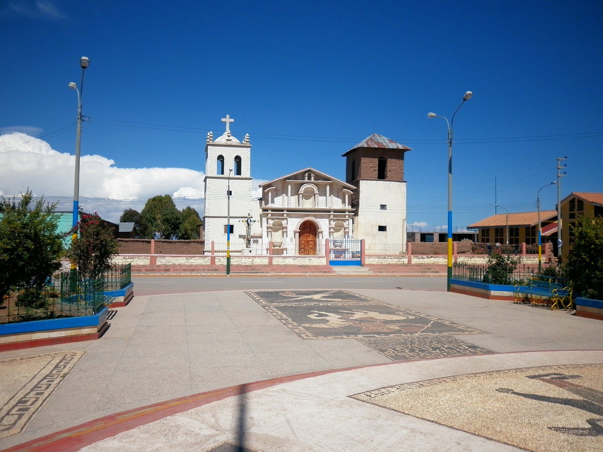 Catedral de Pusi.